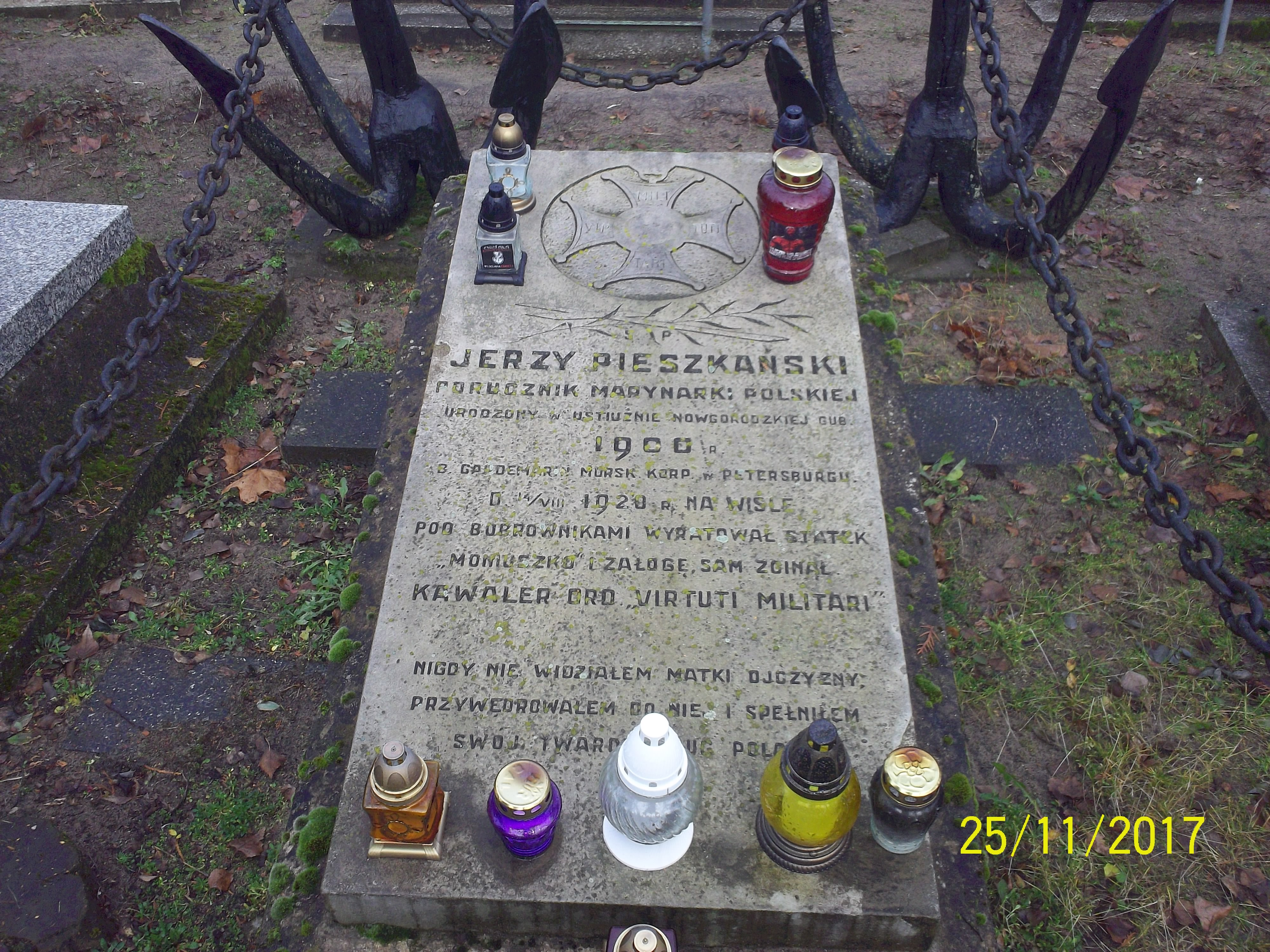 Grób 6